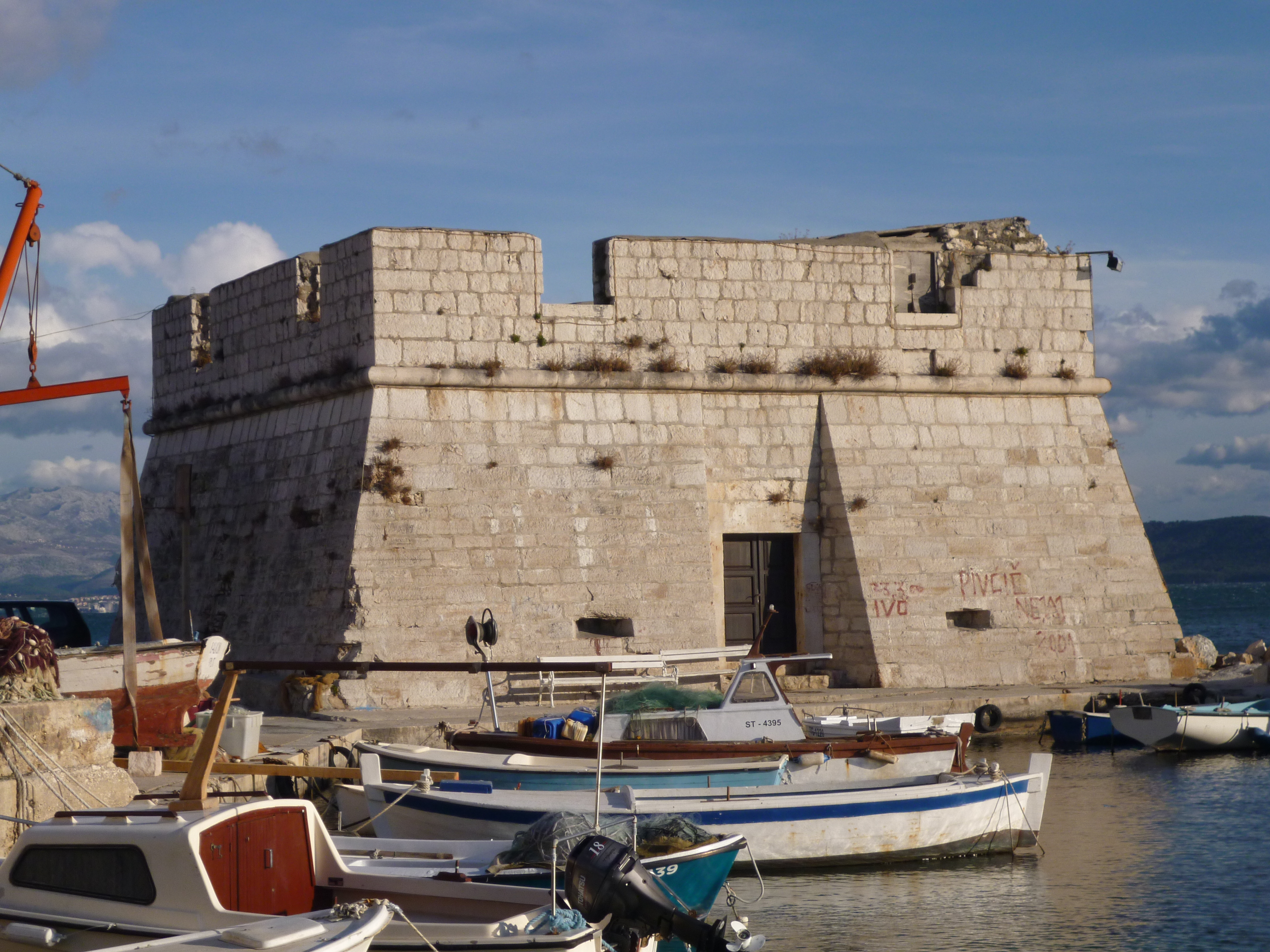 kula Lodi u Kaštel Štafiliću